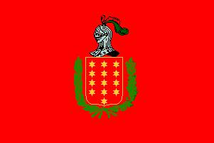 Trapagarango bandera, Bizkaian